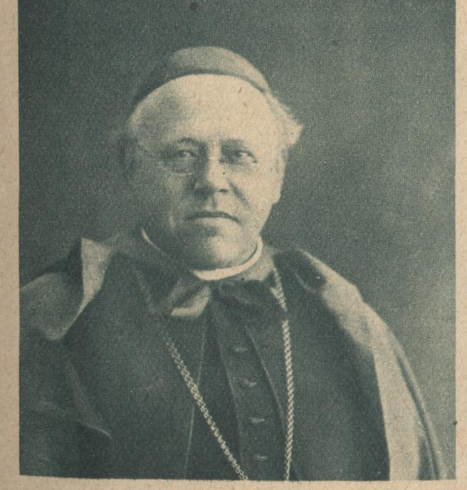 Weihbischof Joseph Pfluger, Wien